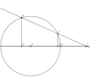 Configuración pel lema 2.